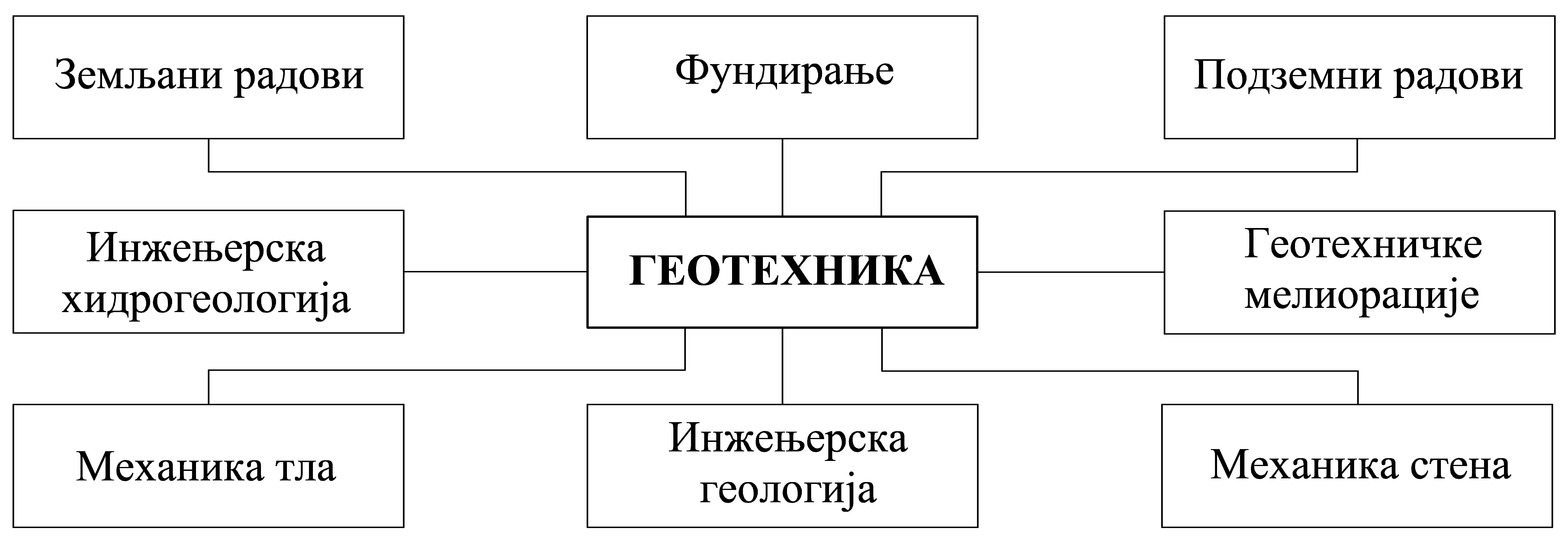 Геотехника.